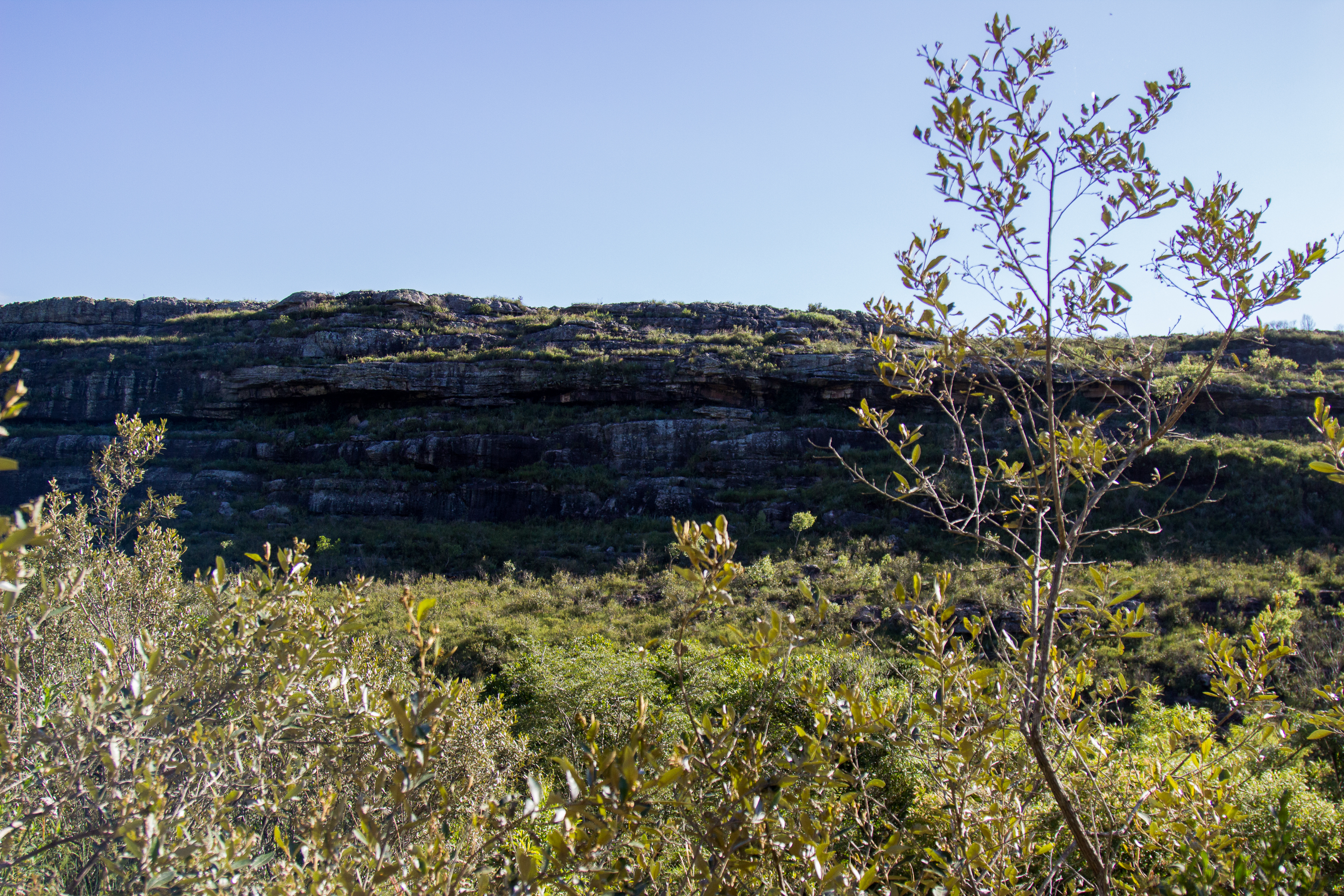 Chapada Montanhosa do Parque dos Campos Gerais, visto do local conhecido como "Cachoeira da Mariquinha".